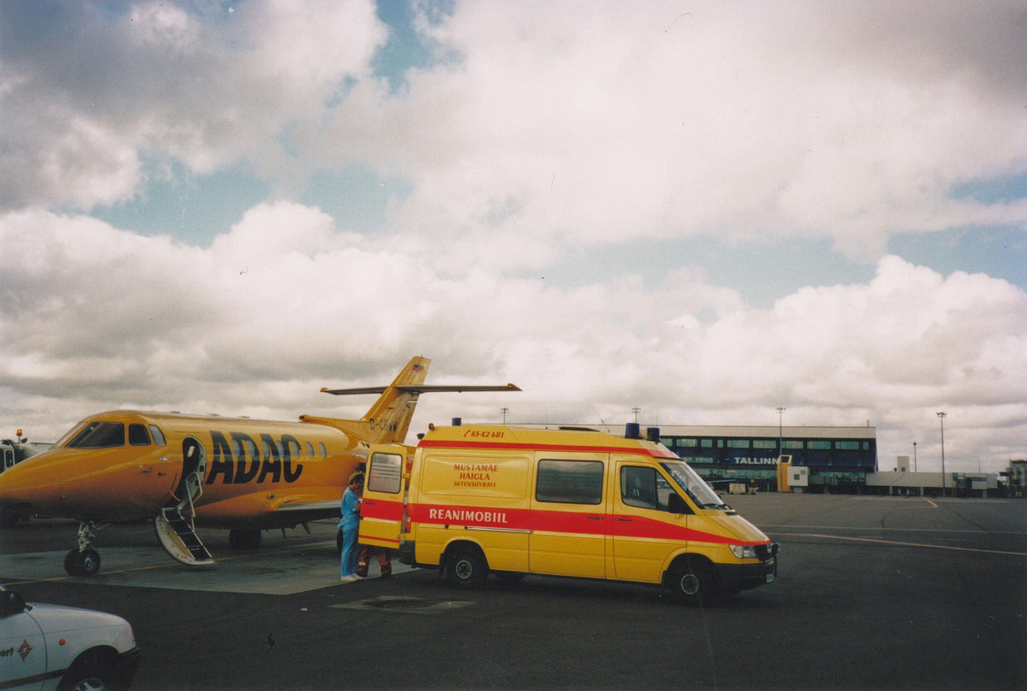 Abholung eines Patienten auf dem Flughafen von Tallinn